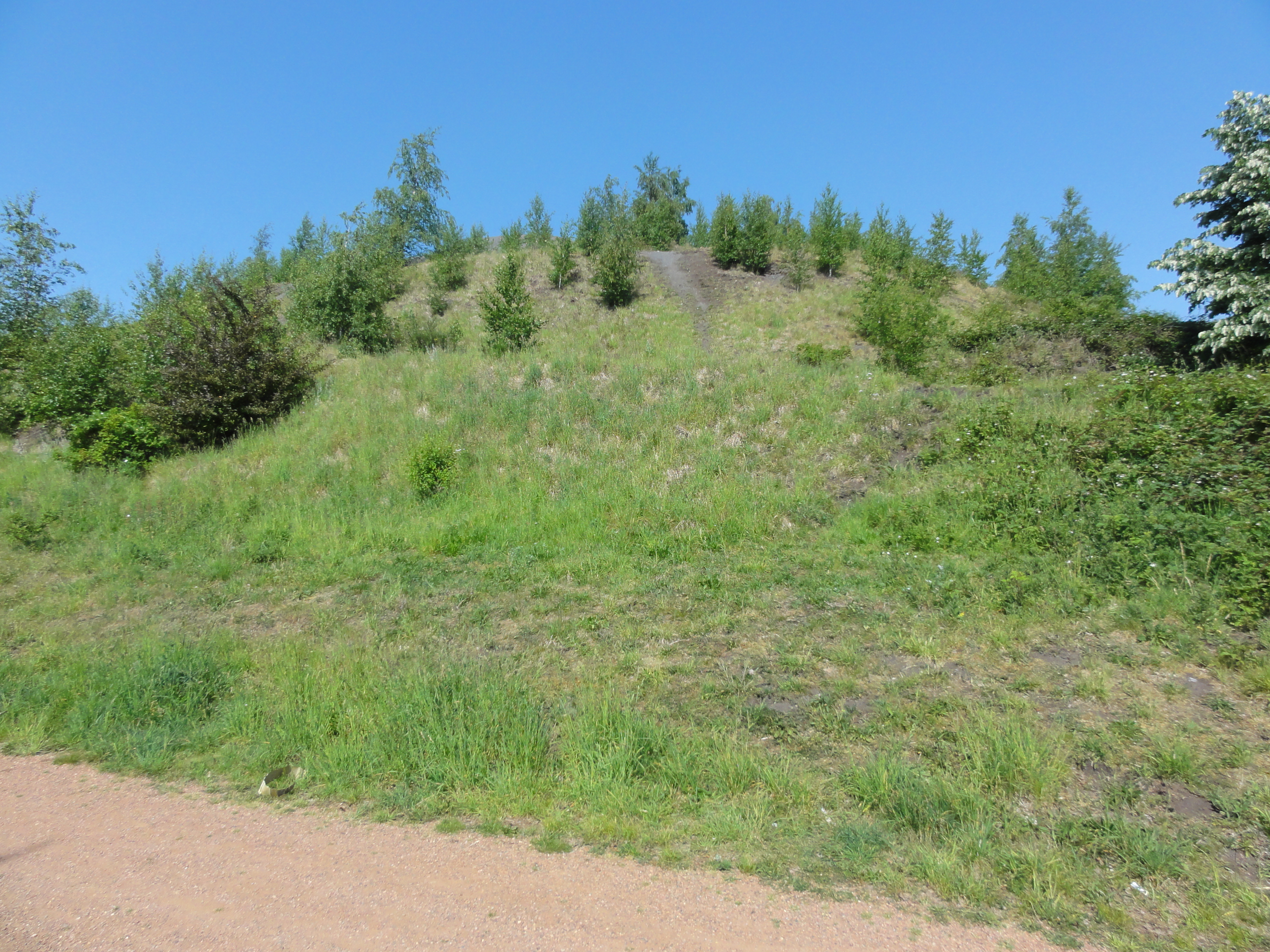 Terril n° 222 dit Saint Roch, Fosse Saint Roch ou n° 1 de la Compagnie des mines d'Azincourt, Monchecourt, Nord, Nord-Pas-de-Calais, France.